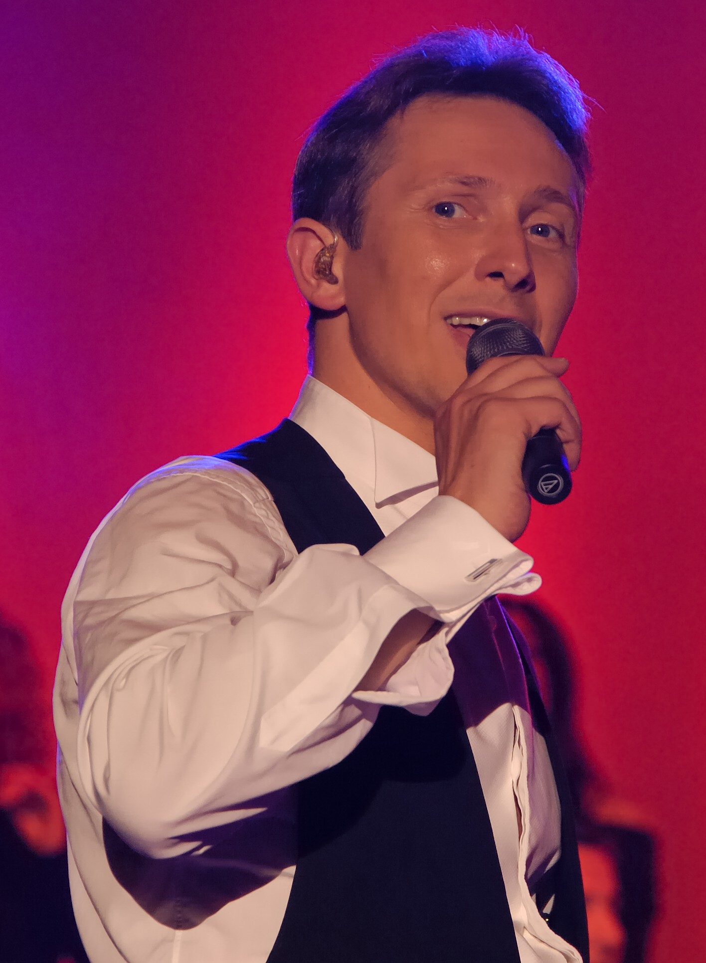 Sänger Helmut Lotti bei einem Konzert in Gotha 2007.